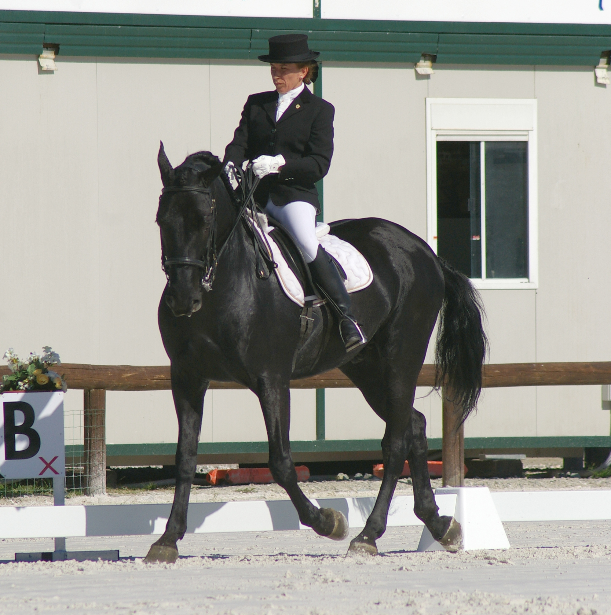 cavallo Murgese Troiano ed Inama Roberta, gara di Dressage